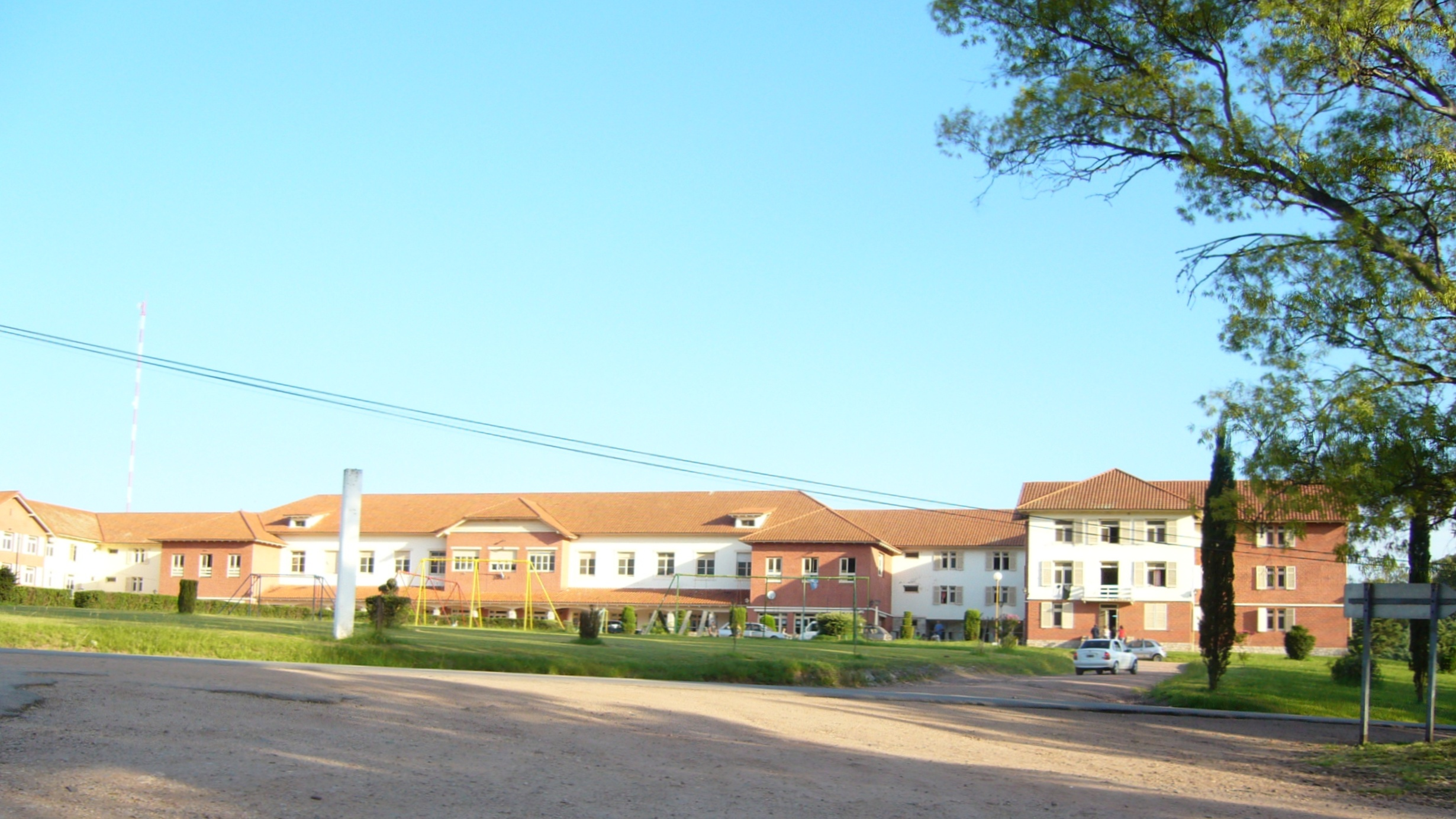 Vista parcial del Hotel N˚ 6 en 2009 Unidad Turística Embalse Córdoba Argentina